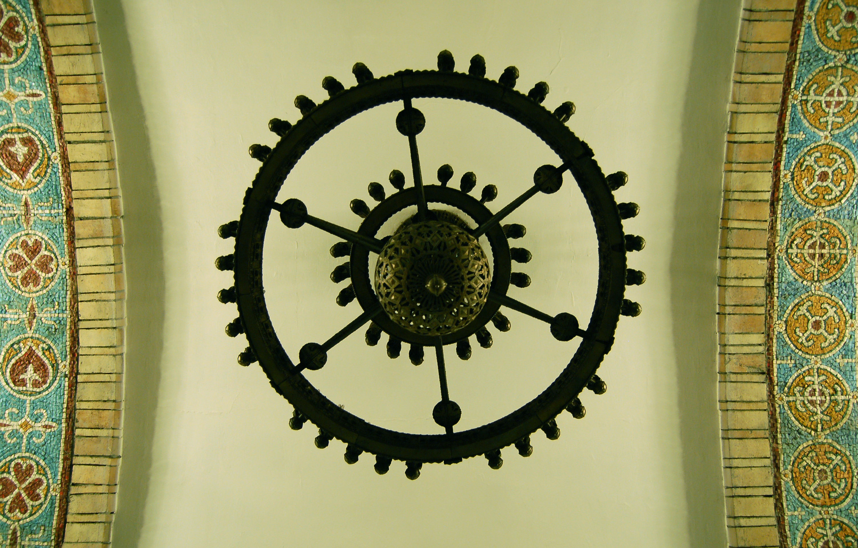 Cтанция метро «Золотые ворота», светильник в центральном зале